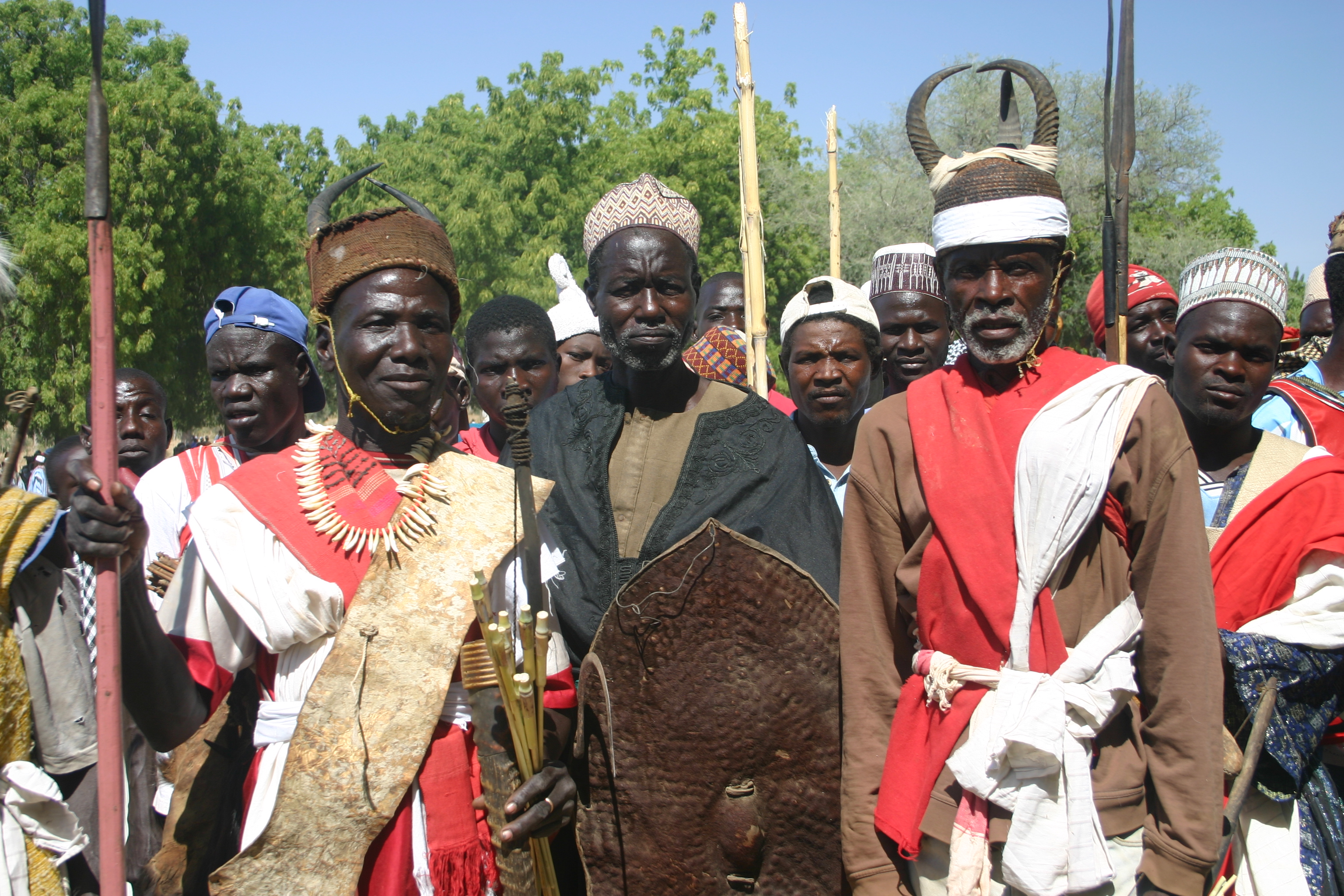 guerriers podoko (Mora)